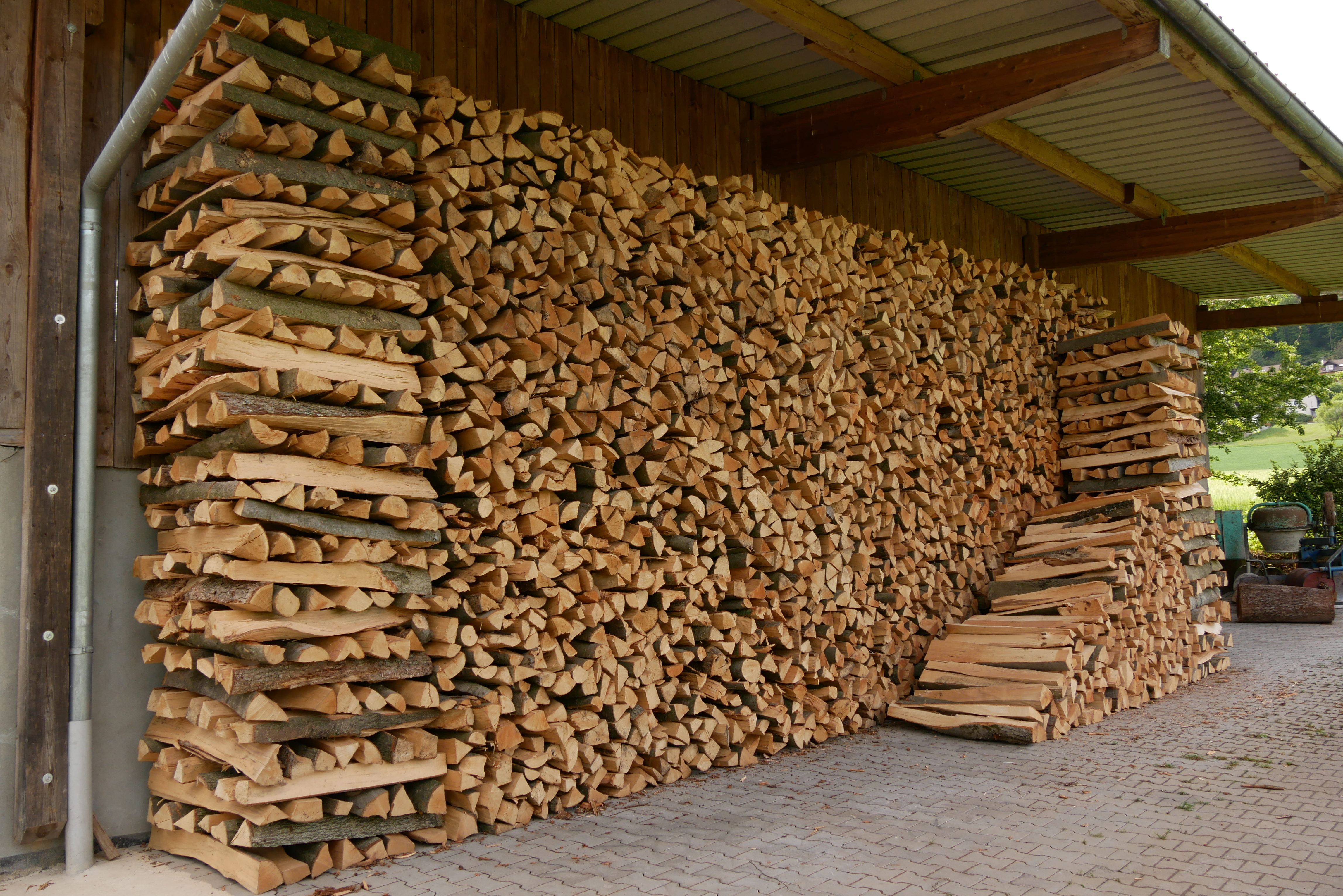 Ca. 40 Ster Buchenholz als Stoß an eine Wand gesetzt. Würde dieser Stoß frei aufgeschichtet werden, würde er vermutlich durch starkes Arbeiten des Holzes irgendwann von alleine umfallen.